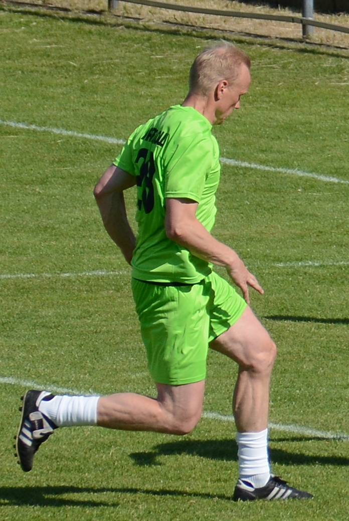 Carsten Ramelow